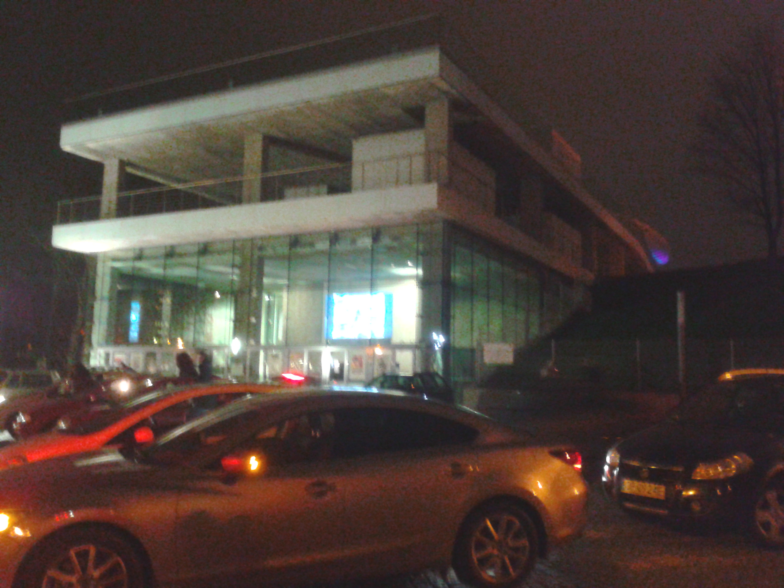 Muzeum Polskiej Piosenki w Opolu nocą.